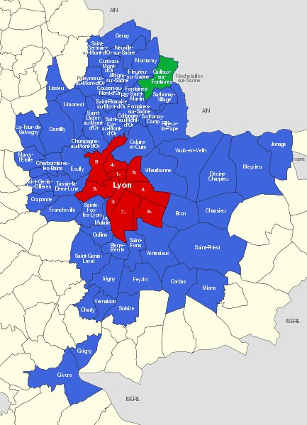 Communes du Grand Lyon, en vert Cailloux-sur-Fontaines